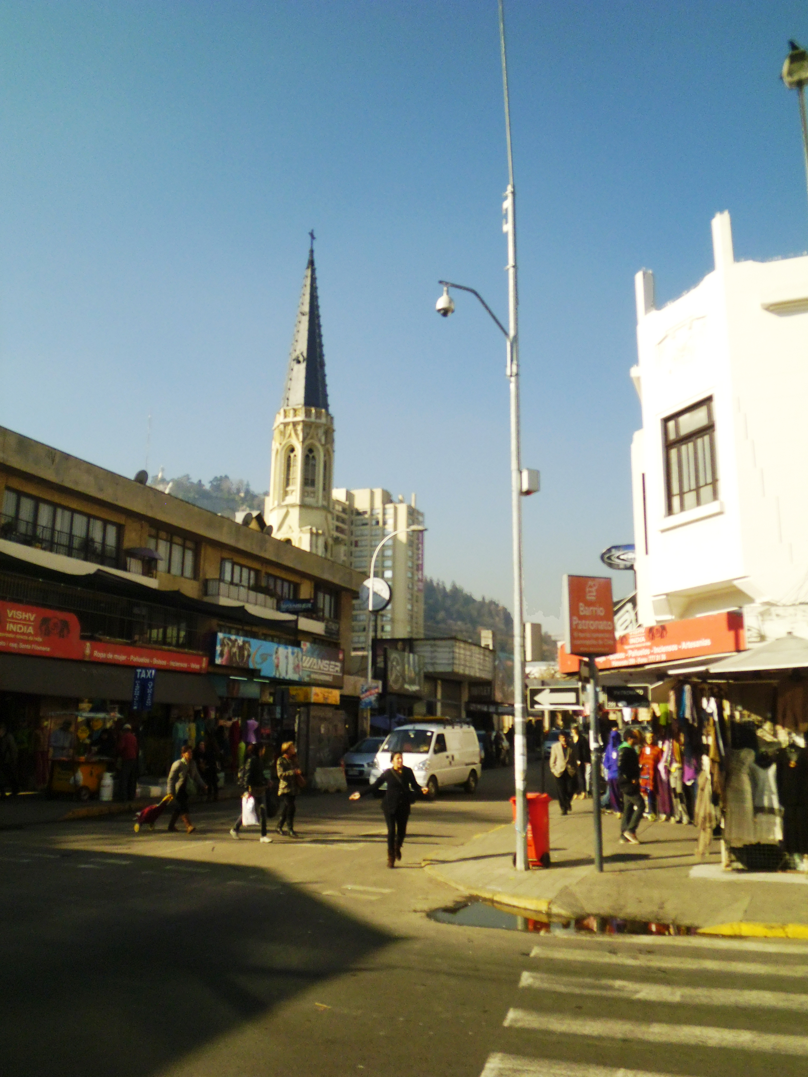 Santa Filomena esquina Patronato hacia el noreste. En segundo plano se ve la Iglesia de la Recoleta Domínica y al fondo el relieve del Cerro San Cristóbal